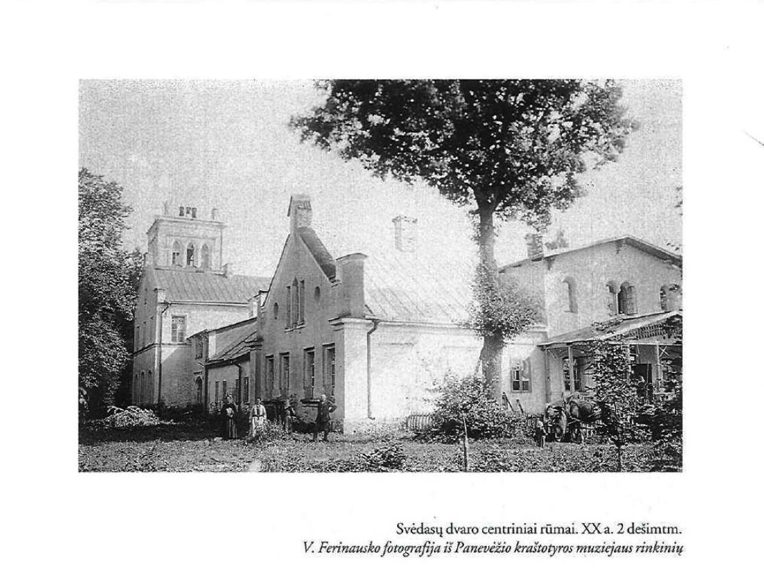 Svėdasų dvaro centriniai rūmai.